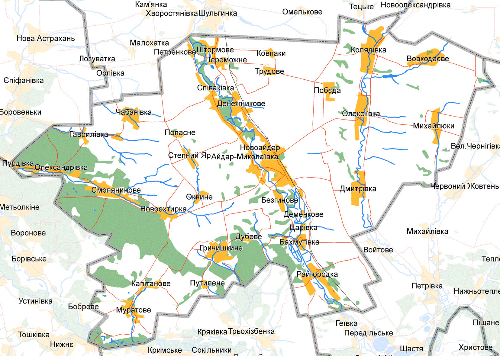 Мапа Новоайдарського району: Мапа Новоайдарського району